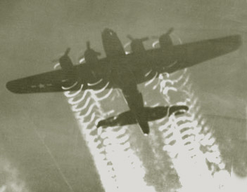 Detail (zoom) to see vapor trail